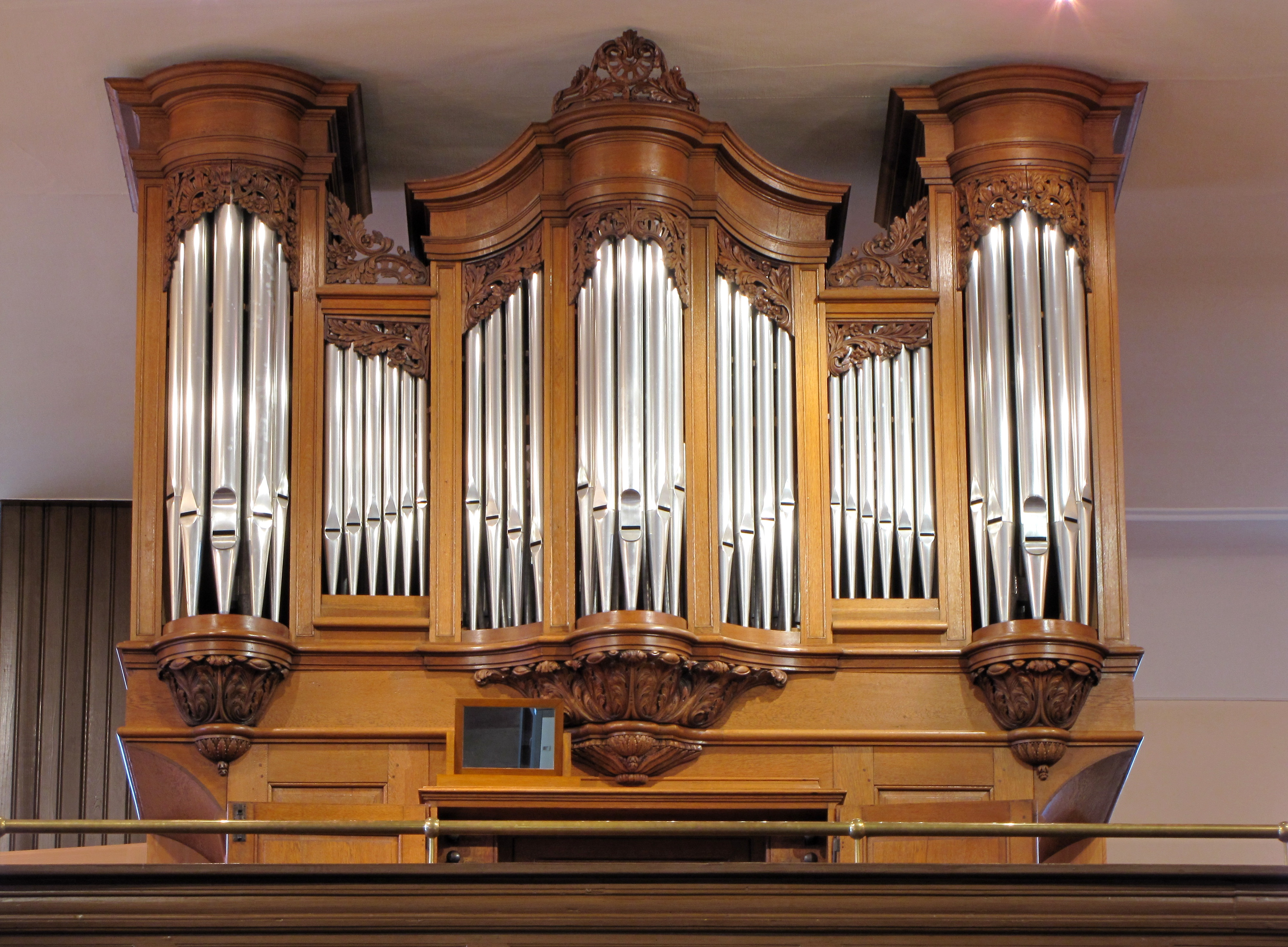 Alsace, Bas-Rhin, Église simultanée Saint-Léger de Kolbsheim (IA00023189). Orgue de tribune Sauer-Bois (1792-1998): This object is classé Monument Historique in the base Palissy, database of the French furniture patrimony of the French ministry of culture, under the references PM67001036, IM67000275 and buffet PM67001037 buffet.